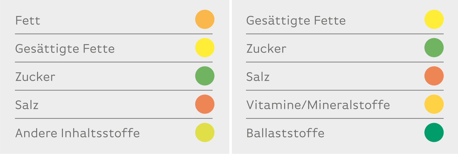 Beispiel einer modifizierten Ampelkennzeichnung am Bespiel einer Vollkornpizza Margaritha